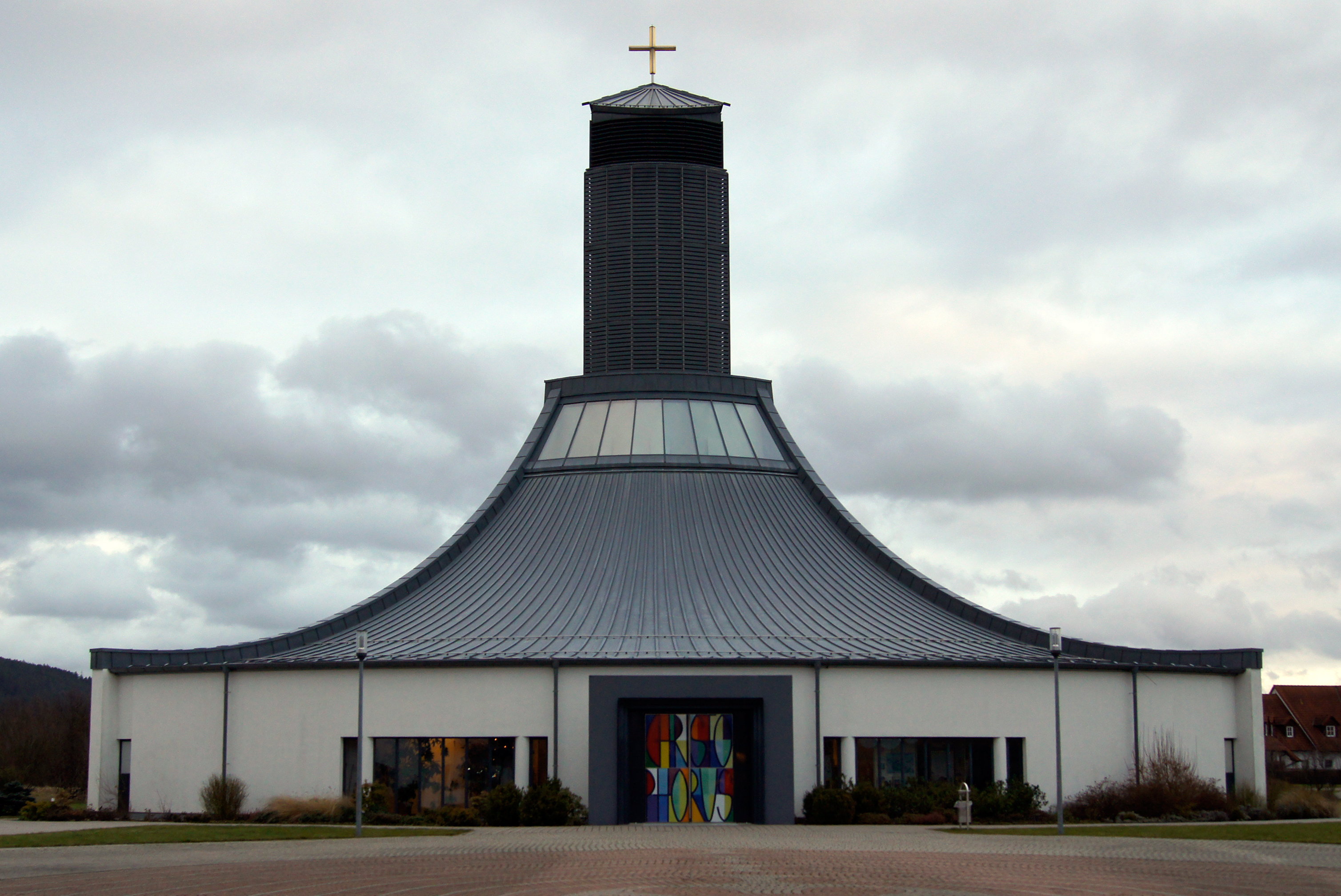 Blick auf die Autobahnkirche (A9), aufgenommen vom Kirchvorplatz, mit einem Teil der Nachbildung des Labyrinths aus der Kathedrale von Chartres.Unknown